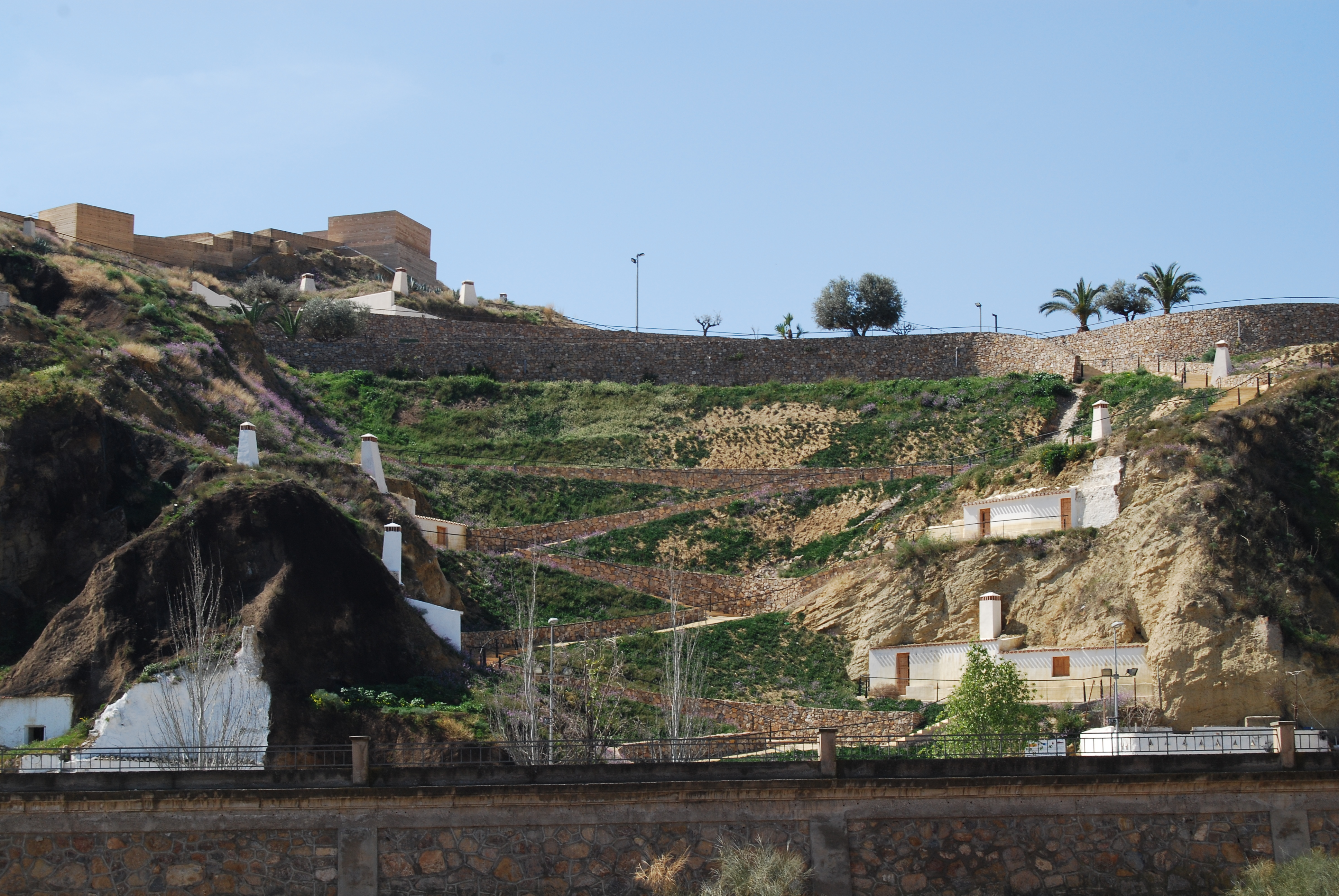 Adecuación de los accesos al Castillo de Nogalte a través de la cuesta de la Pava donde se conservan varias casas cueva